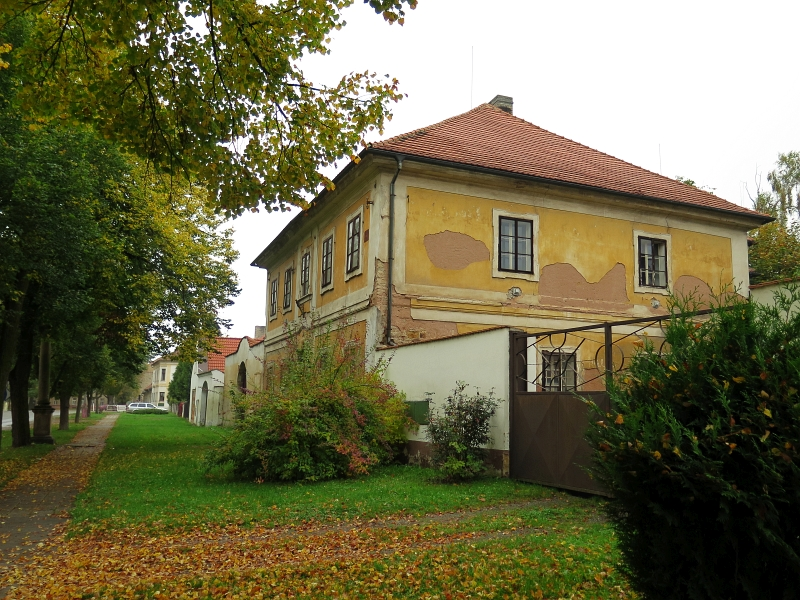 Fara, Václavské náměstí 26, Kněževes (okres Rakovník).